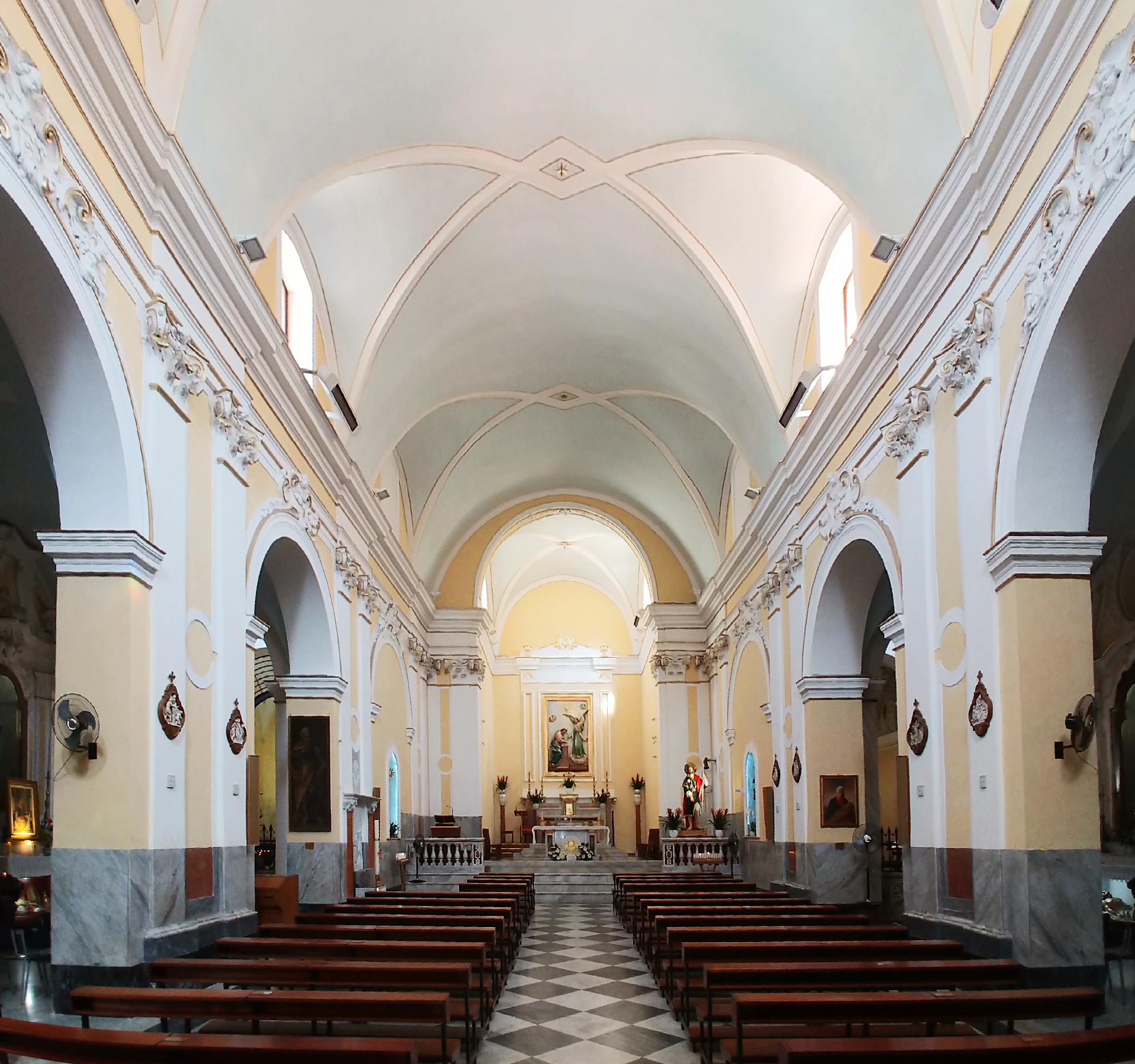 Interno.